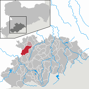 Stollberg/Erzgeb. im Erzgebirgskreis, Sachsen